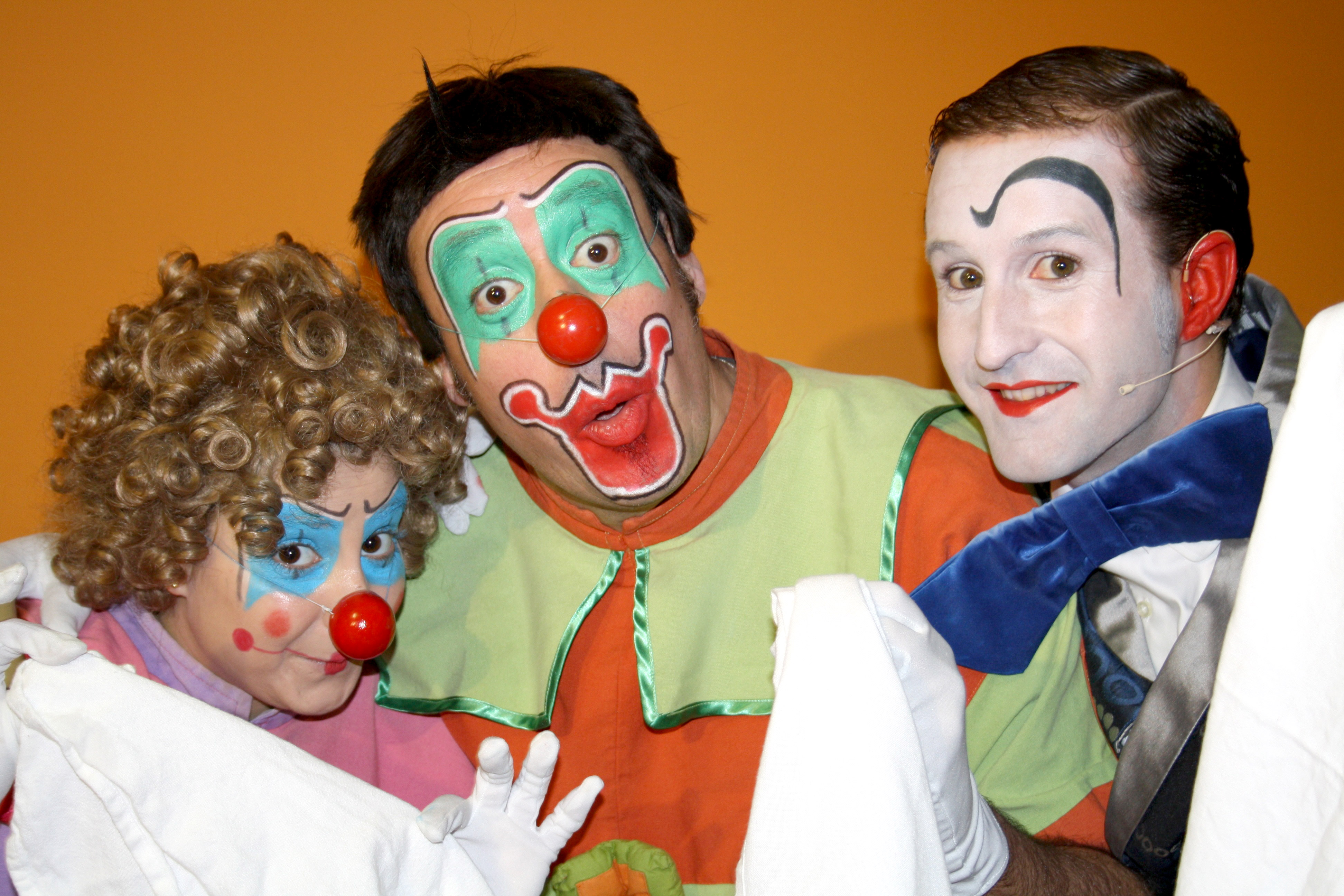 Txirri, Mirri eta Txiribiton, 2013an